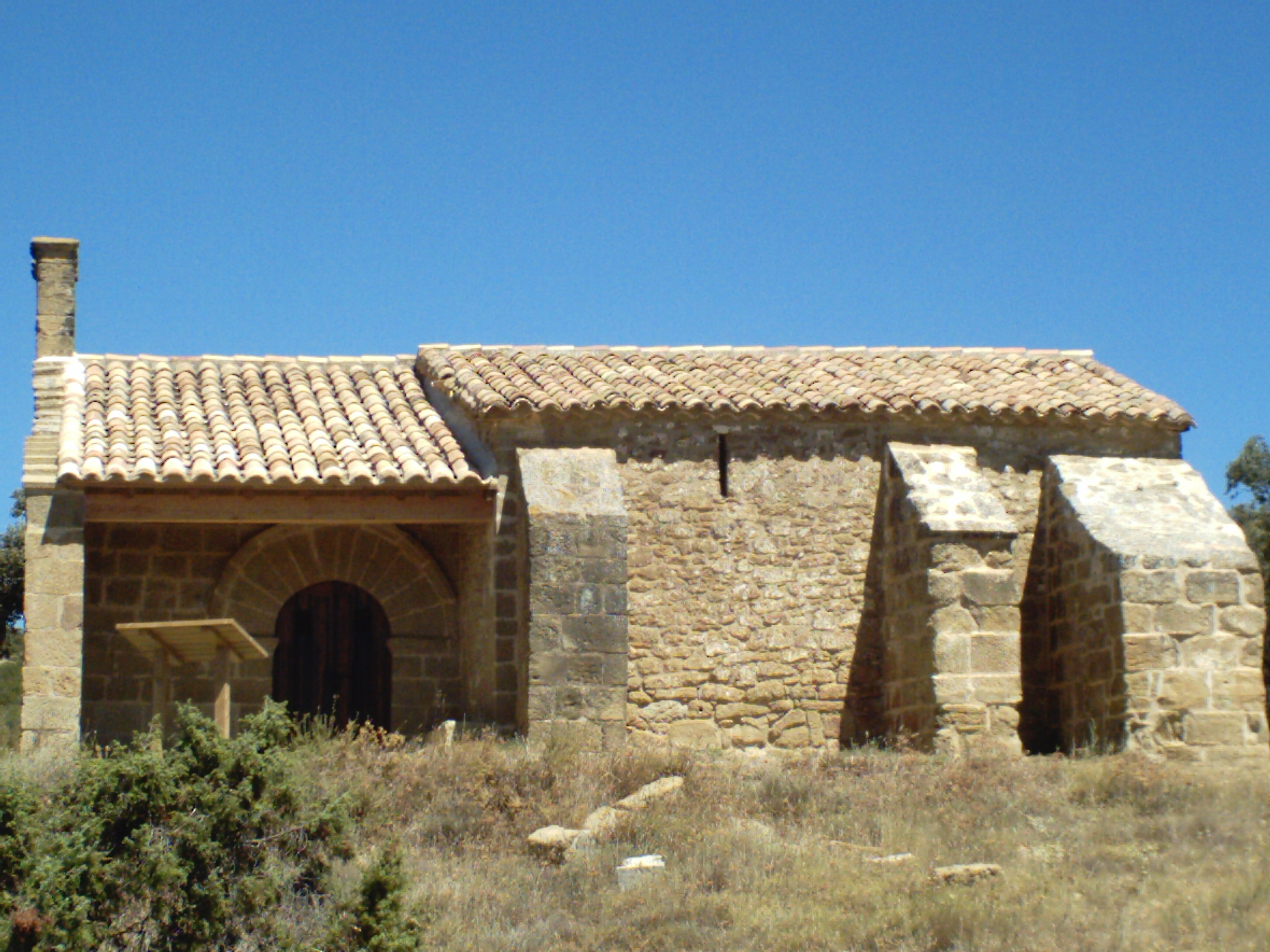 Imagen de la fachada de la ermita de Santa María del Monte, a un kilómetro escaso de la localidad oscense de Liesa.